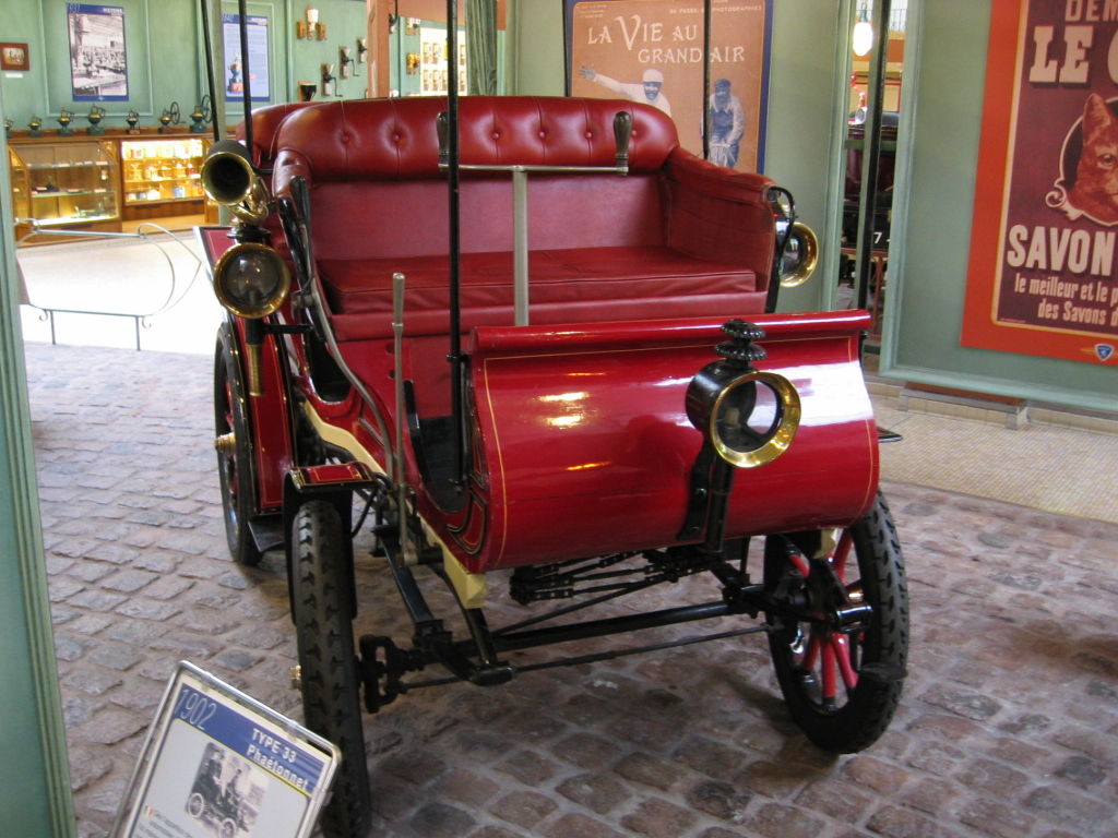 Peugeot Type 33 - Musée Peugeot Sochaux